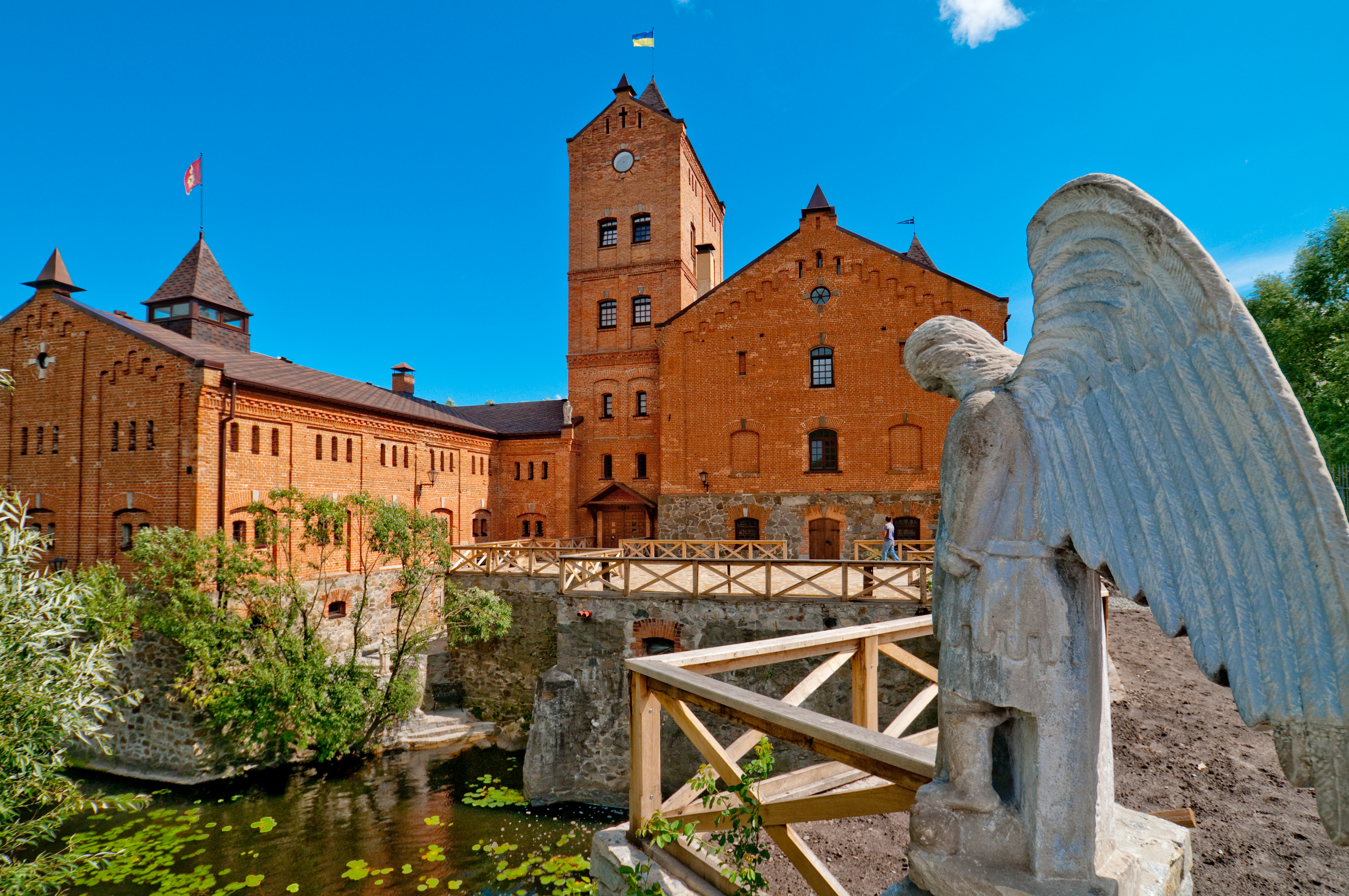 Общий вид на здание историко-культурного комплекса "Замок Радомысль"